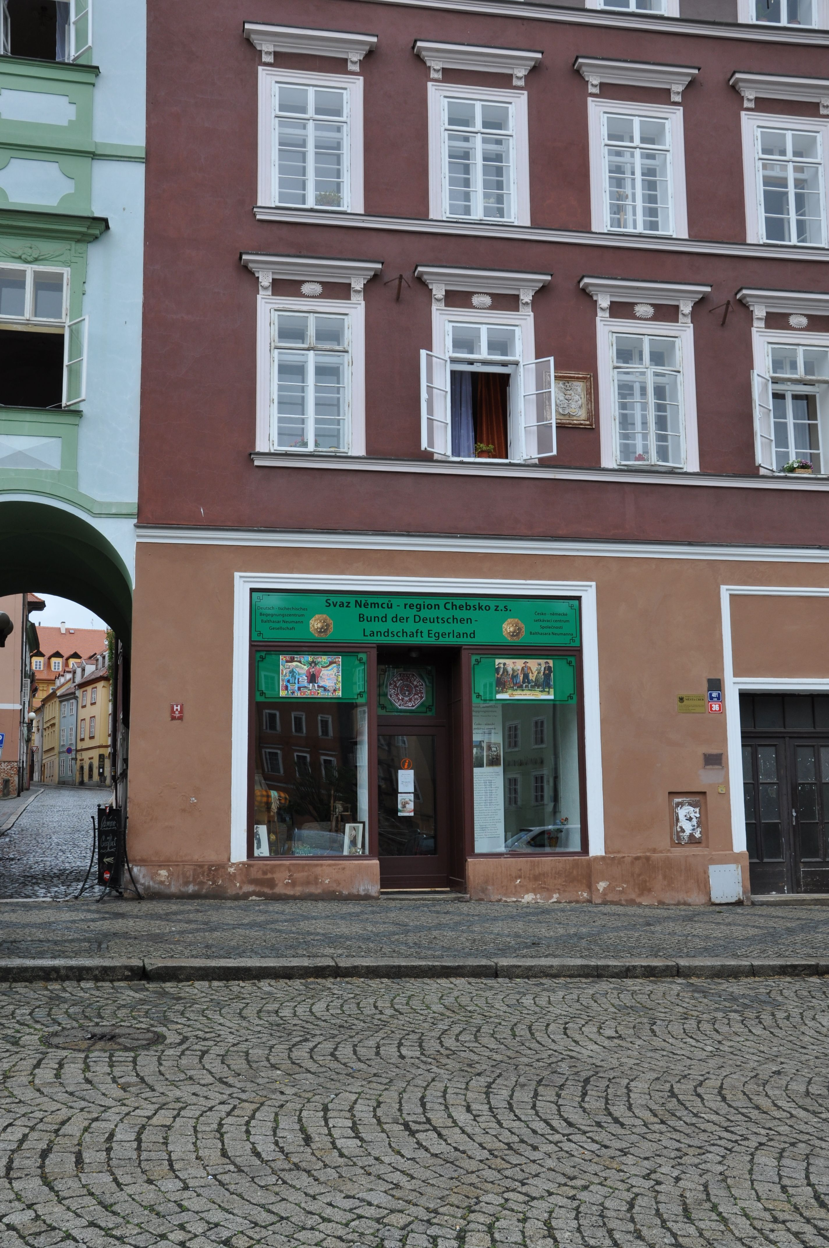 Begegnungszentrum des Bundes der Deutschen - Landschaft Egerland im Balthasar-Neumann-Haus in Cheb/Eger